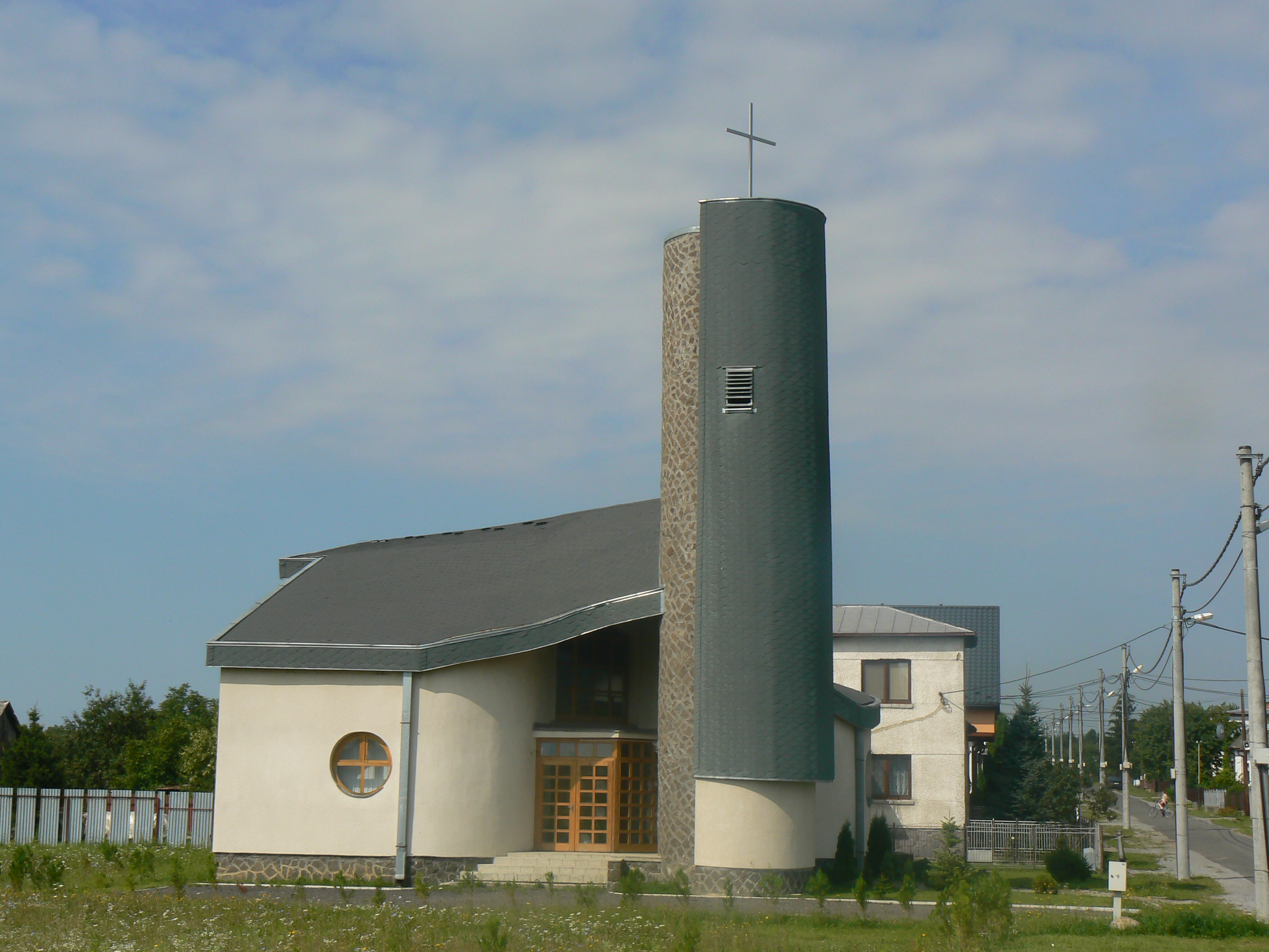 Kostol Sedembolestnej Panny Márie, Kusín.